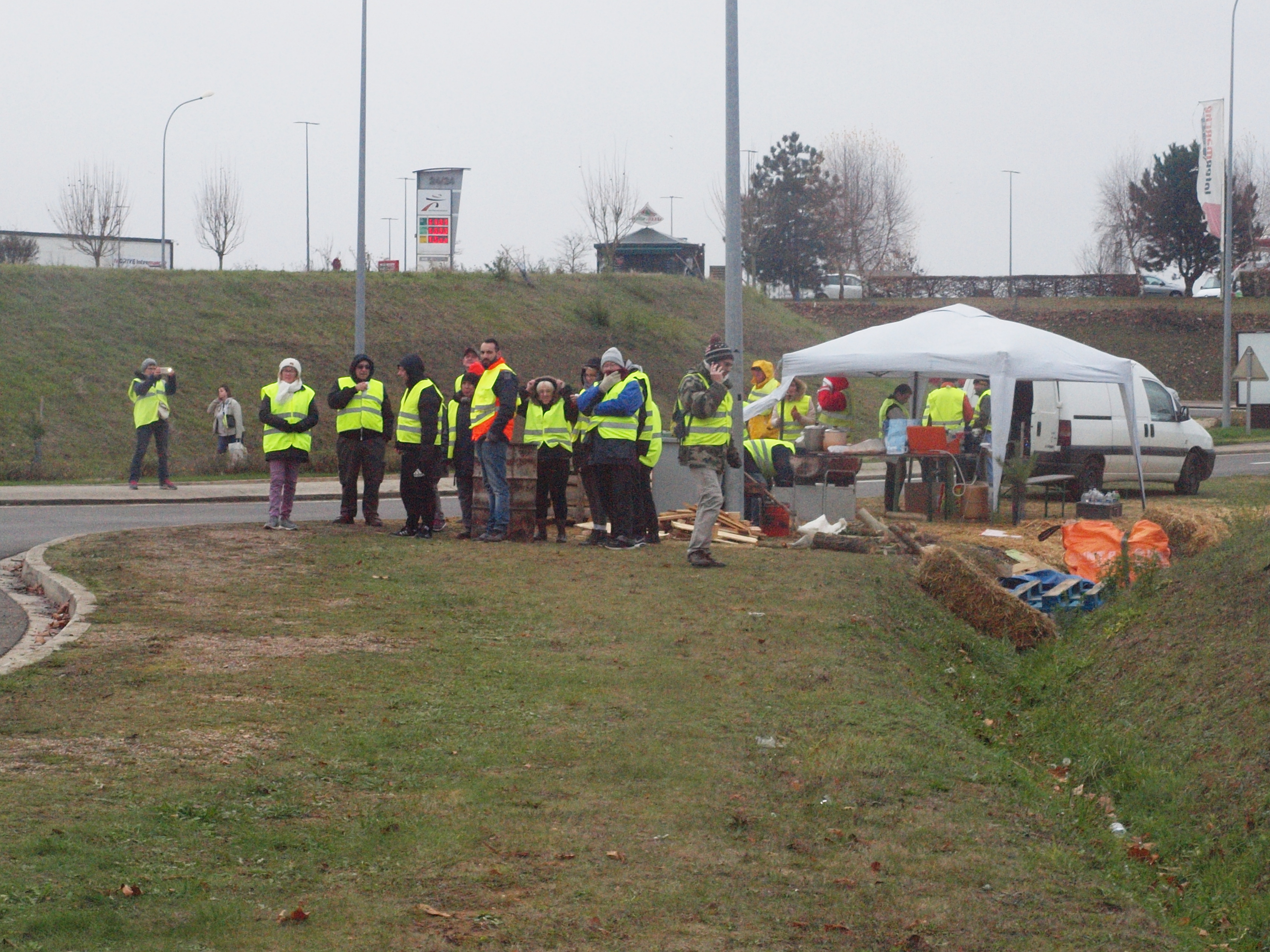 Action de communication & de signature de pétition, auprès des conducteurs au rond-point déviation RN6/route de Cheroy à Villeneuve-la-Guyard (Yonne, France) , le 1er décembre 2018